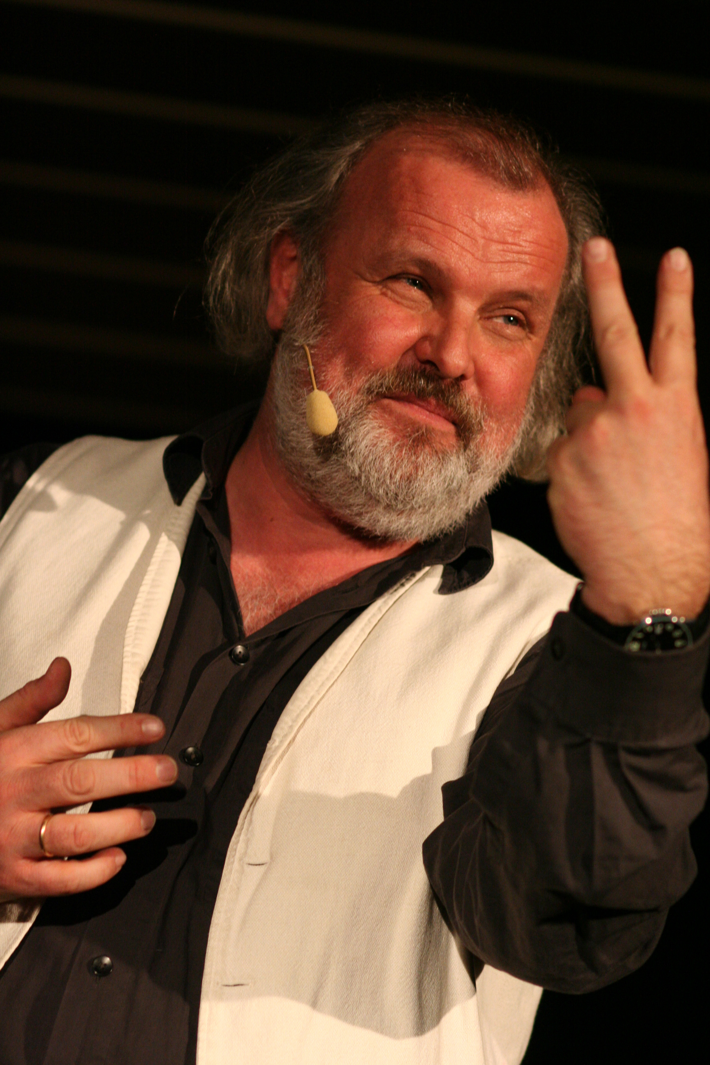 Portrait of the German comedian Otmar Traber